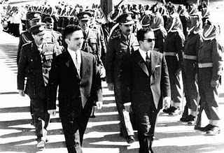 صورة تجمع كل من الملك فيصل الثاني والملك الحسين بن طلال ملك الاردن